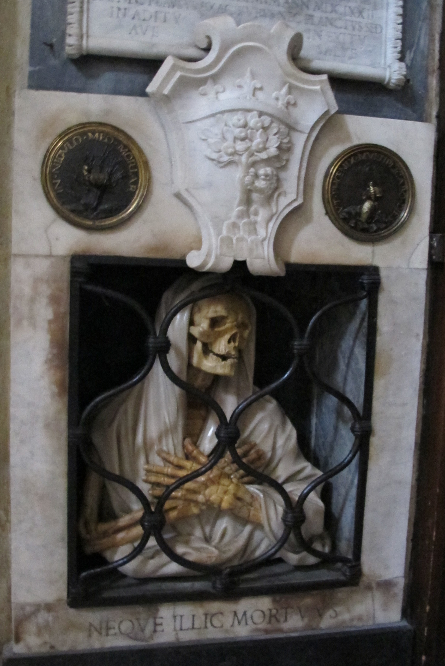 Santa maria del popolo, monum a giovanni battista gisleni, 2